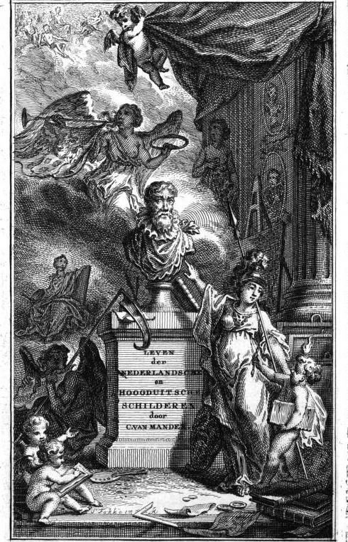 Het leven der doorluchtige Nederlandsche en eenige Hoogduitsche Schilders, Volume 1 By Carel van Mander, Jacobus De Jongh